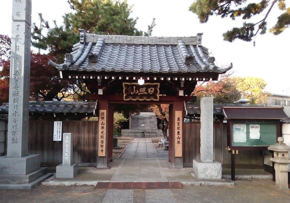 葛飾区東堀切の普賢寺